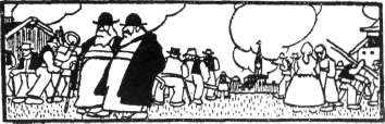 Илустрација из првог издања књиге Поп Ћира и поп Спира.